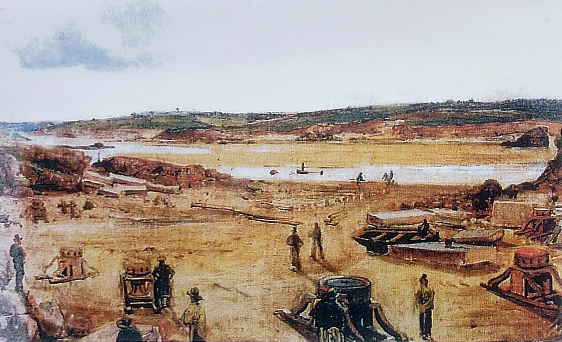 La préparation de l'embarquement des 5 blocs de granite monumentaux destinés à former le piédestal de l'obélisque de Louxor sur la place de la Concorde à Paris ; les bases de la cale de chargement, dans l'anse Stivel sont déjà en place (septembre 1835, tableau anonyme, musée du Ponant à Saint-Renan).